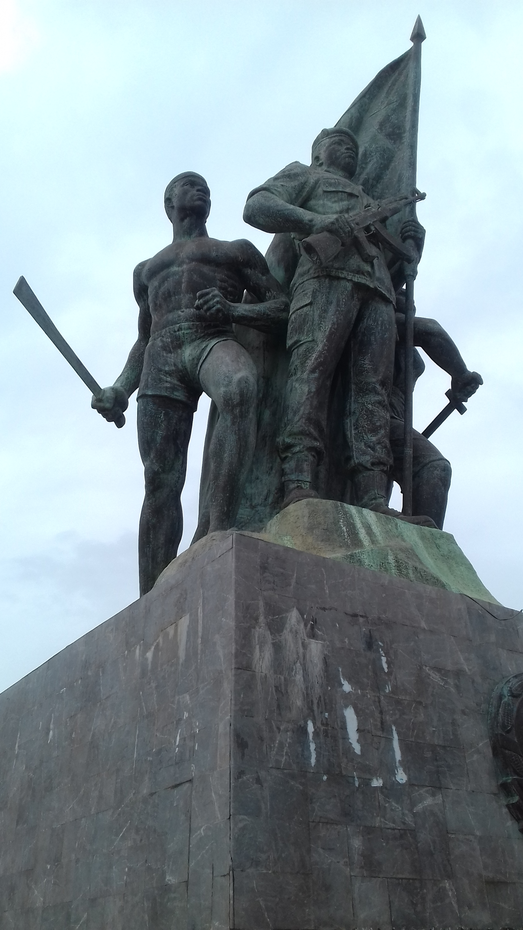 Place du souvenir. Monument occupant une place de la ville de Cotonou, au Bénin, située dans le quartier Haie Vive. Elle est encore appelée, place des Martys. Wikidata has entry Q16510194 with data related to this item.